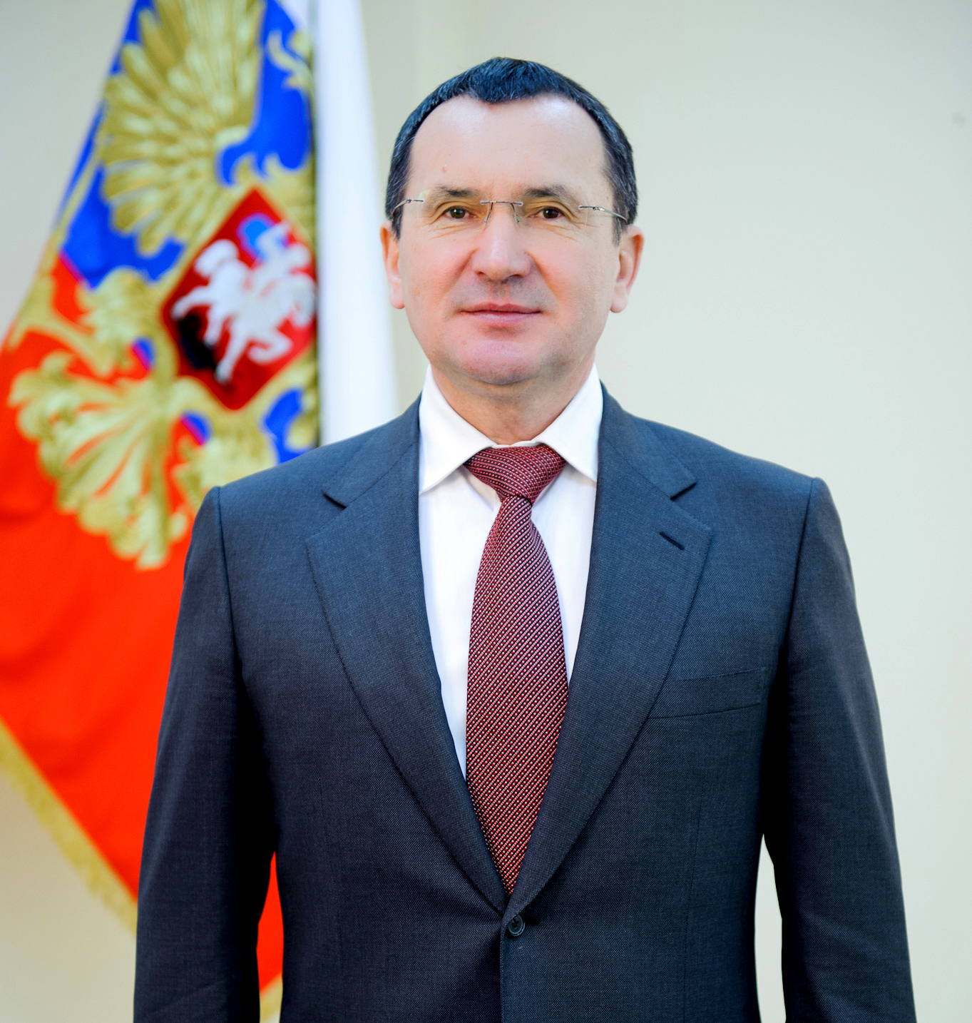 Министр сельского хозяйства Российской Федерации